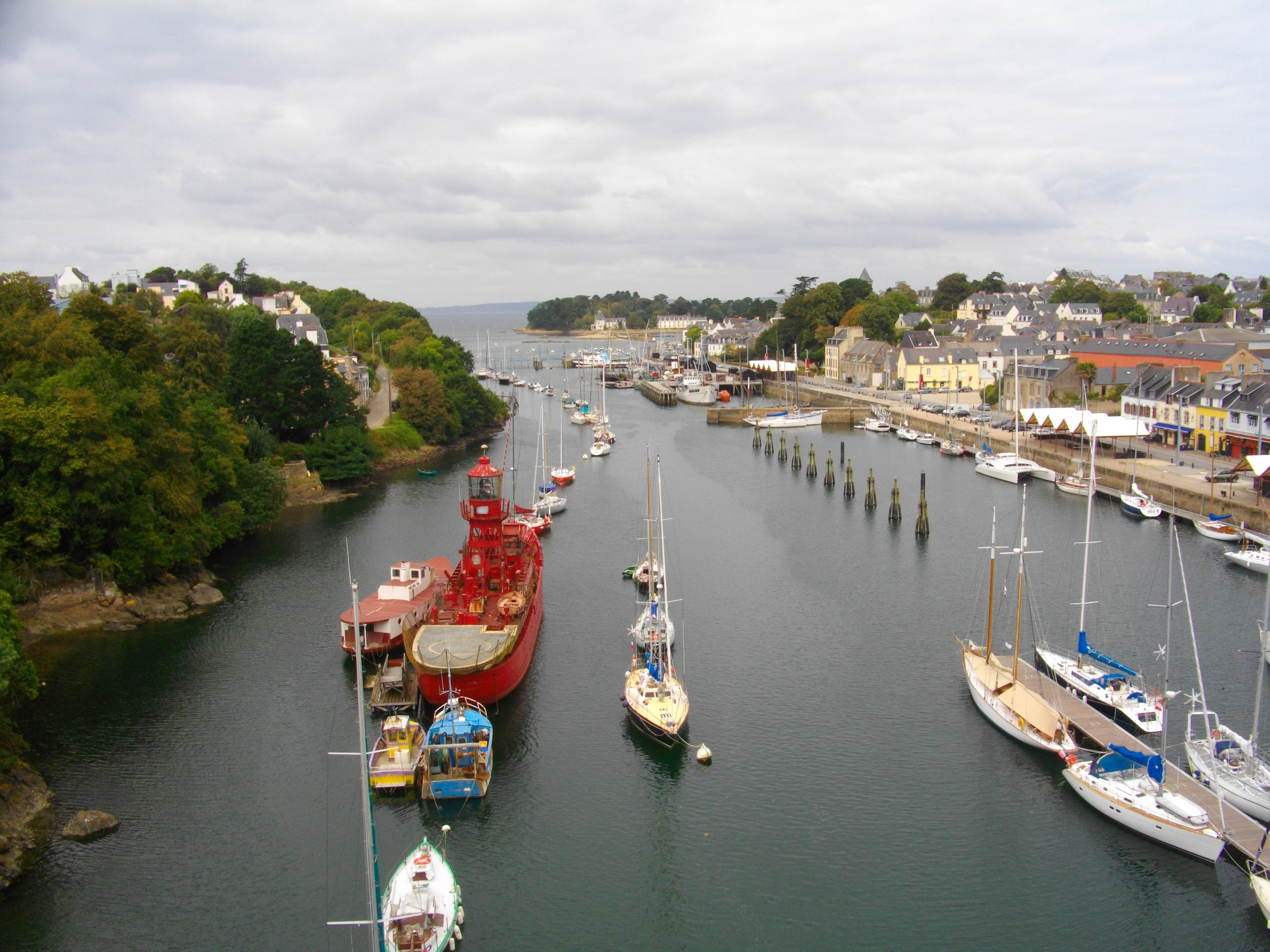 La ria du Port-Rhu (Douarnenez) et le Port-Musée avec, notamment le bateau-phare ; à droite Douanenez (centre), à gauche tréboul, à l'arrière-plan l'Île Tristan.